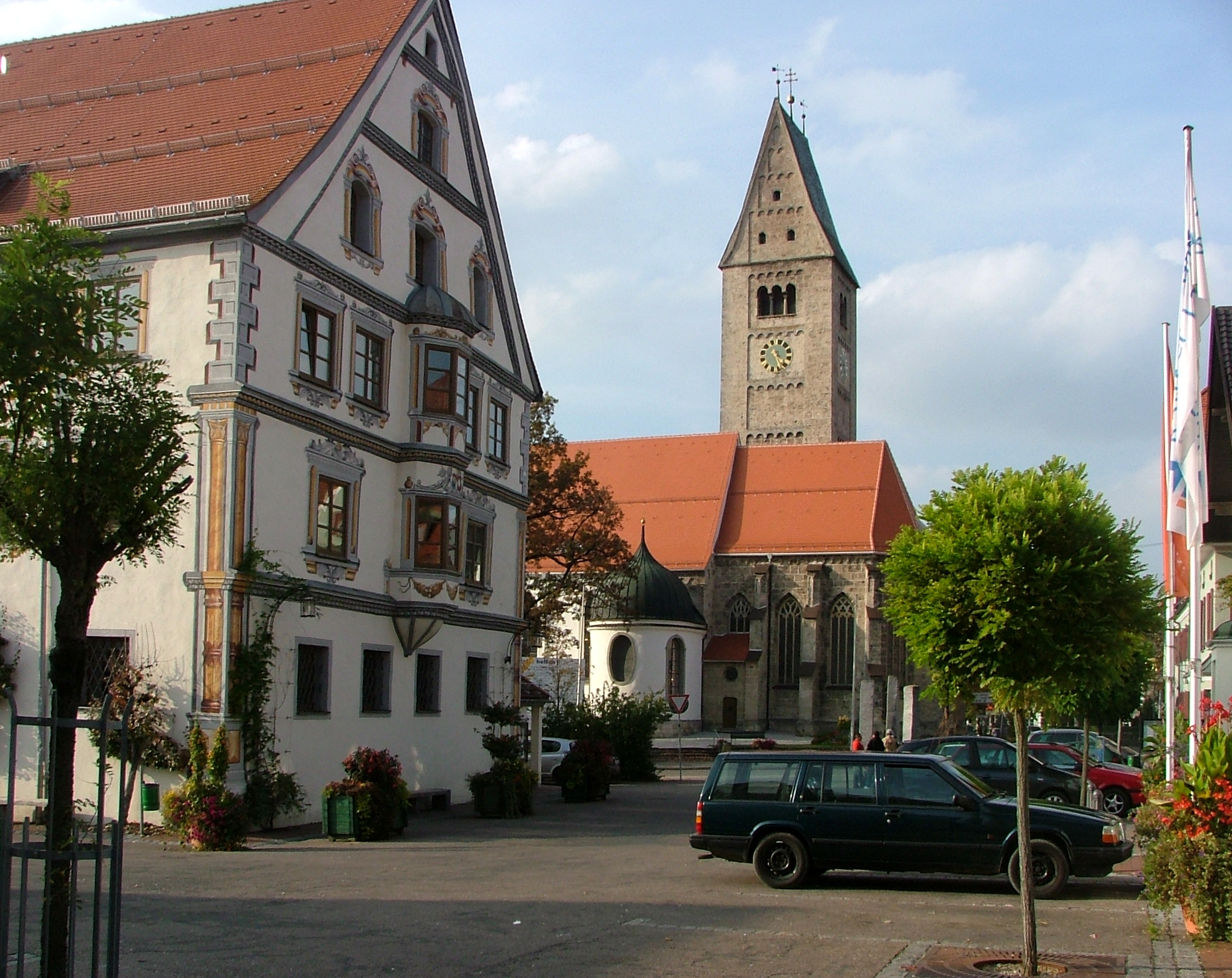 Obergünzburg